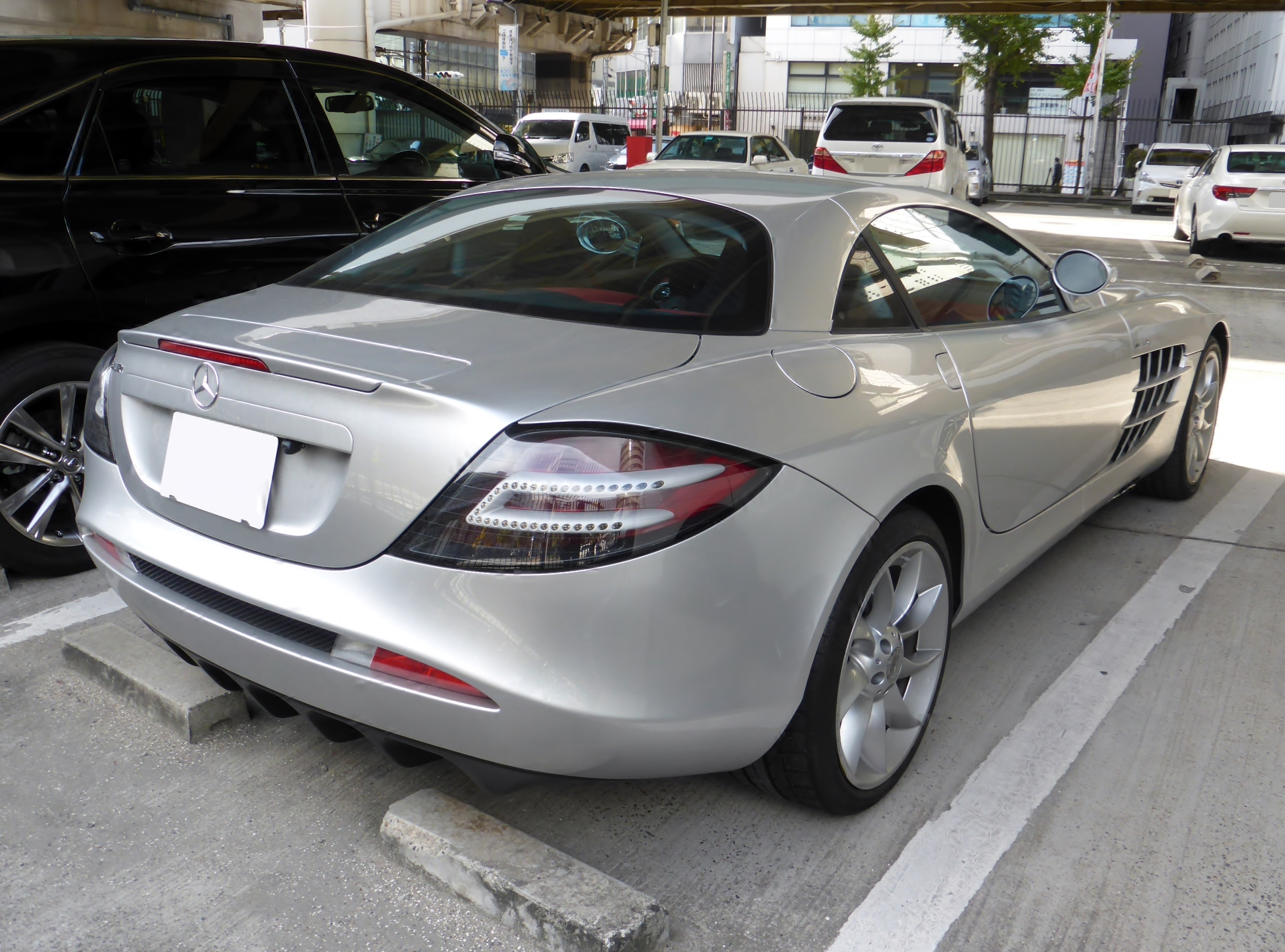 C199型メルセデス・ベンツSLRマクラーレンをリアから撮影。